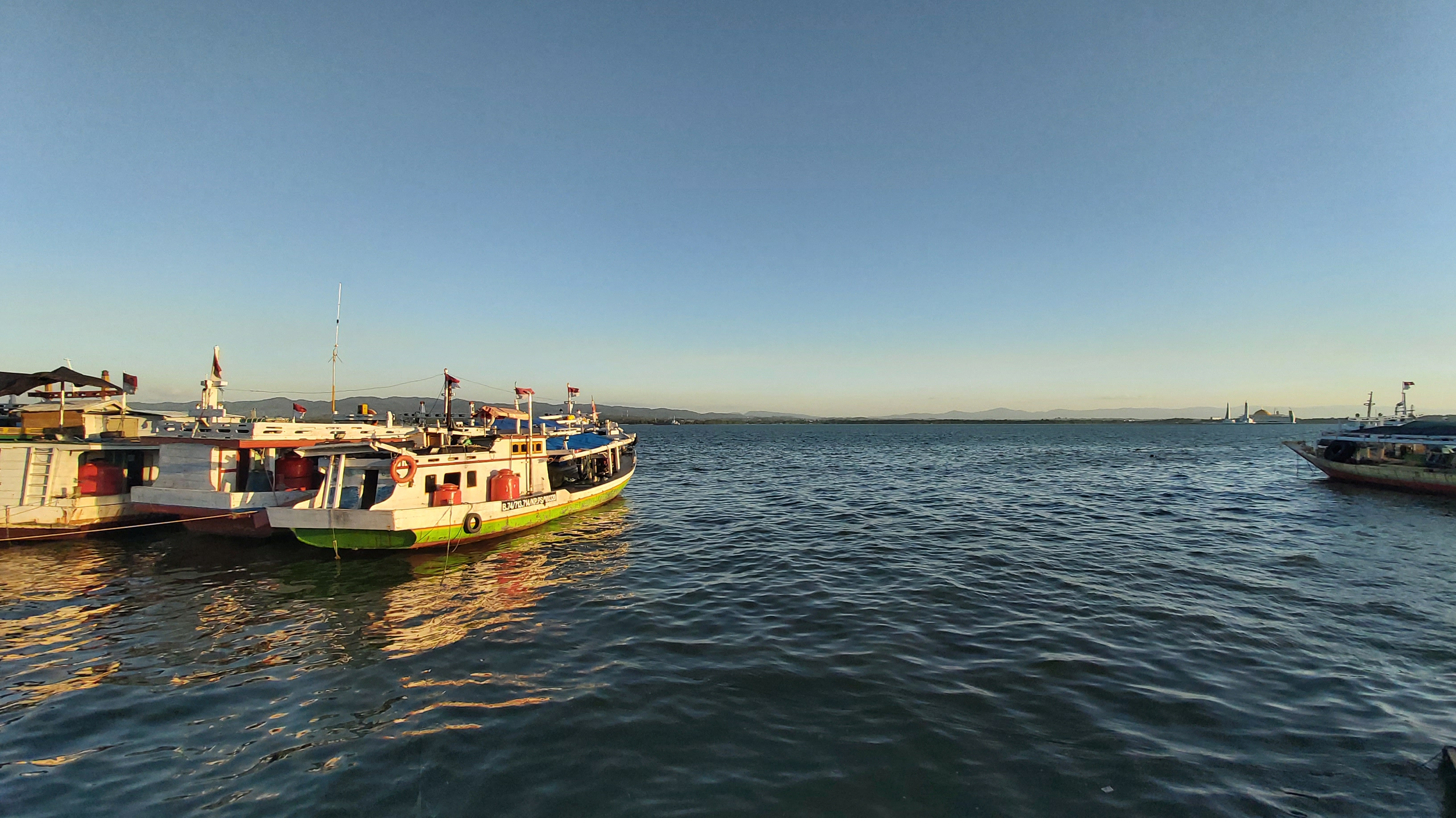 Sunset di Teluk Kendari